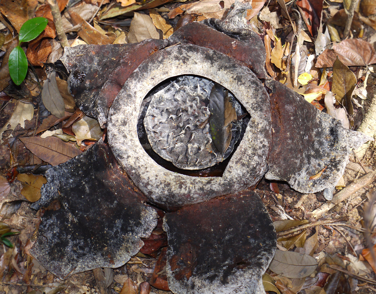 Verblühte Rafflesia in Khao Sok (Thailand)